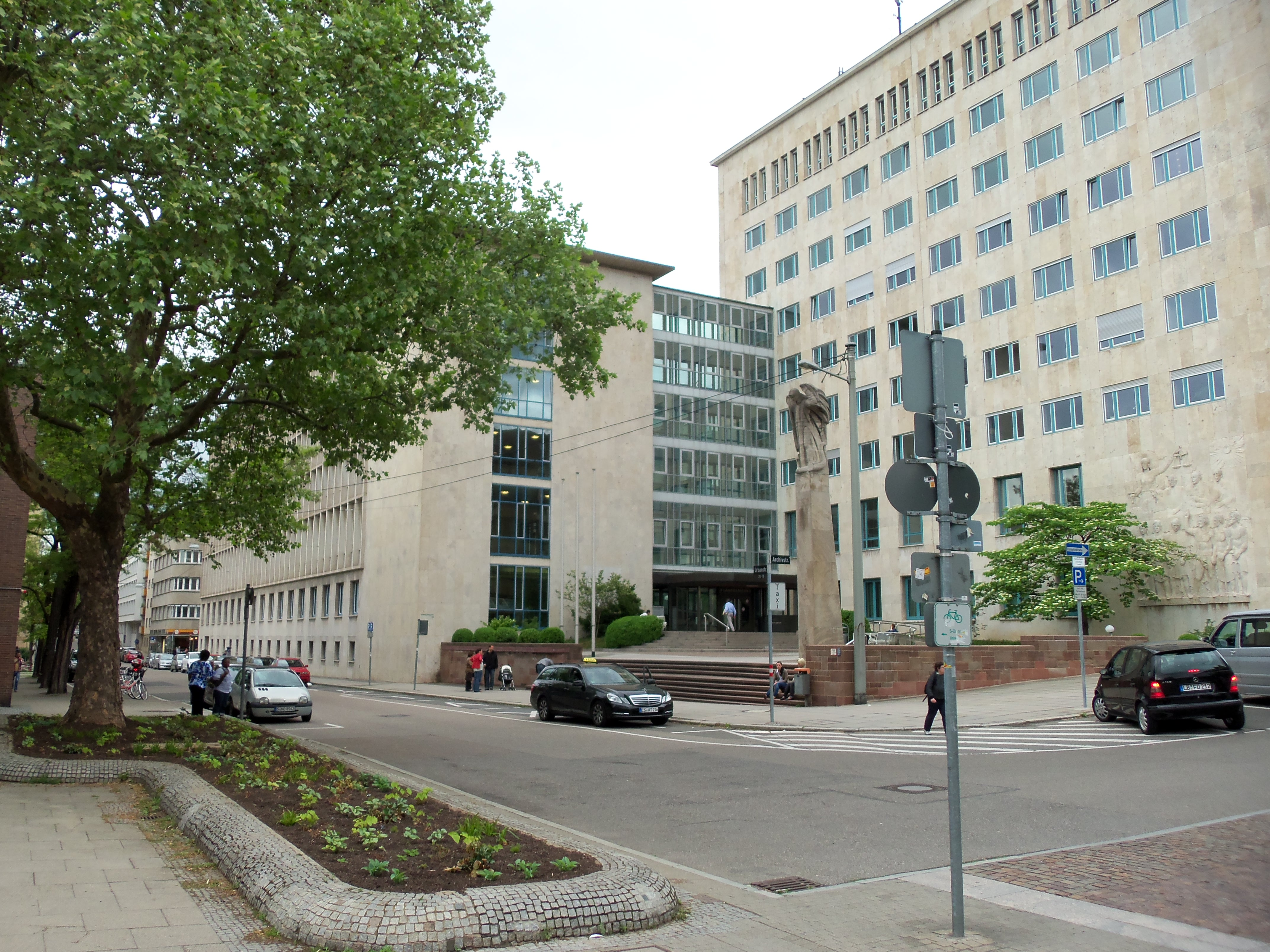 Landgericht Stuttgart Eingang Urbanstraße, gegenüber Württembergischer Landesbibliothek